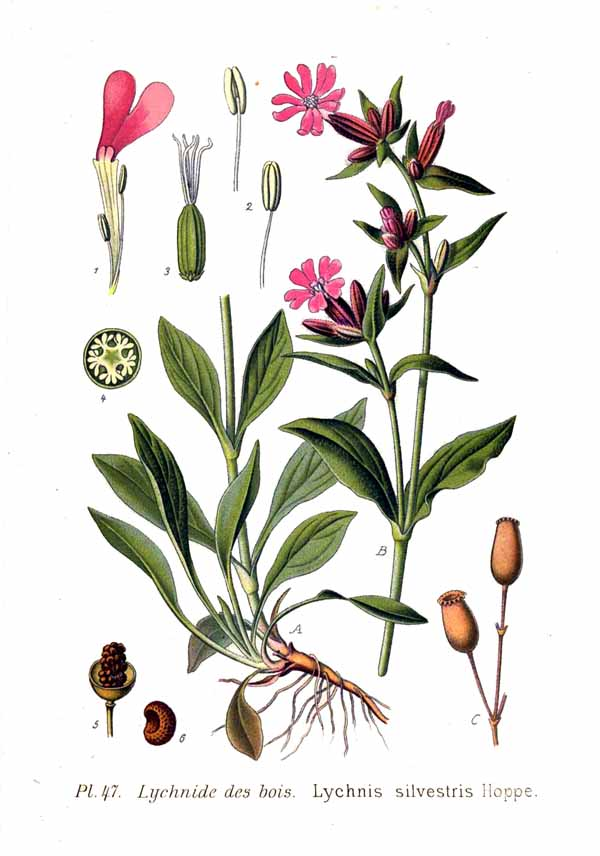 Silene dioica (L.) Clairv., syn. Lychnis silvestris Hoppe.